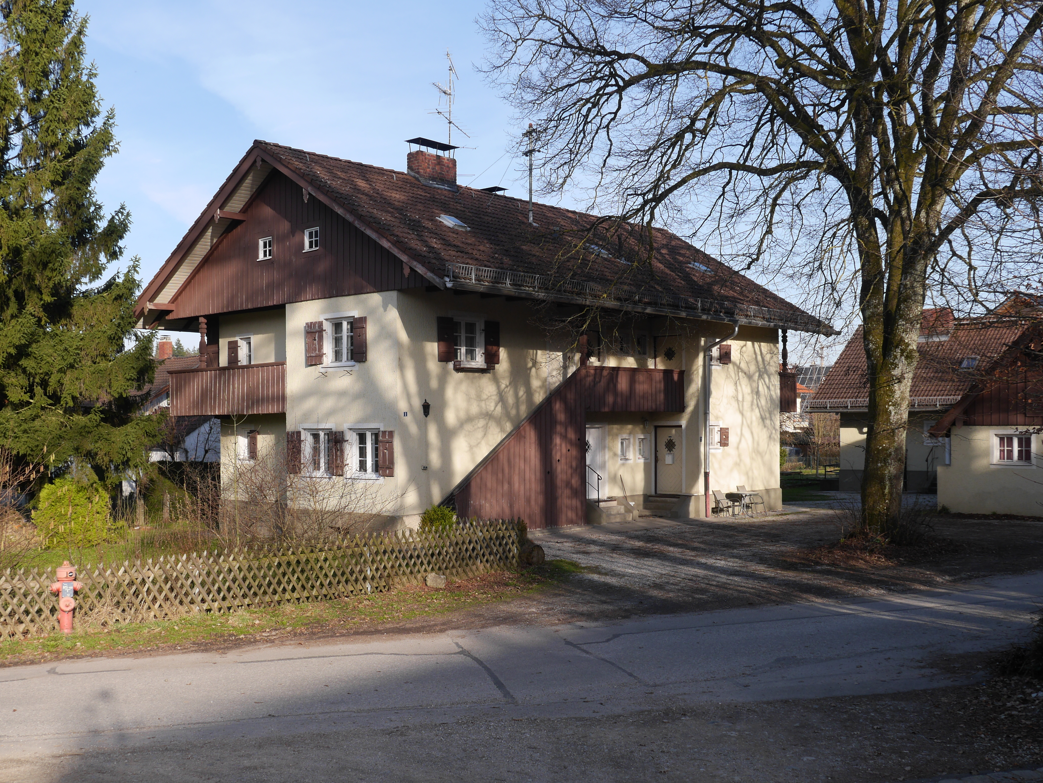 Koloniestraße 1 in der Eisenbahner- und Schwellenfabrikarbeitersiedlung Kirchseeon, von 1905/06This is a photograph of an architectural monument.